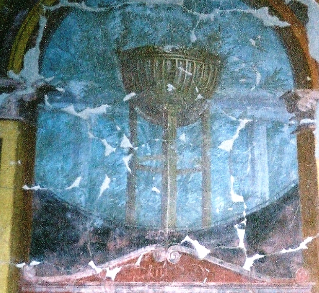 Détail d'une fresque de la villa de Poppée à Oplontis (Italie)